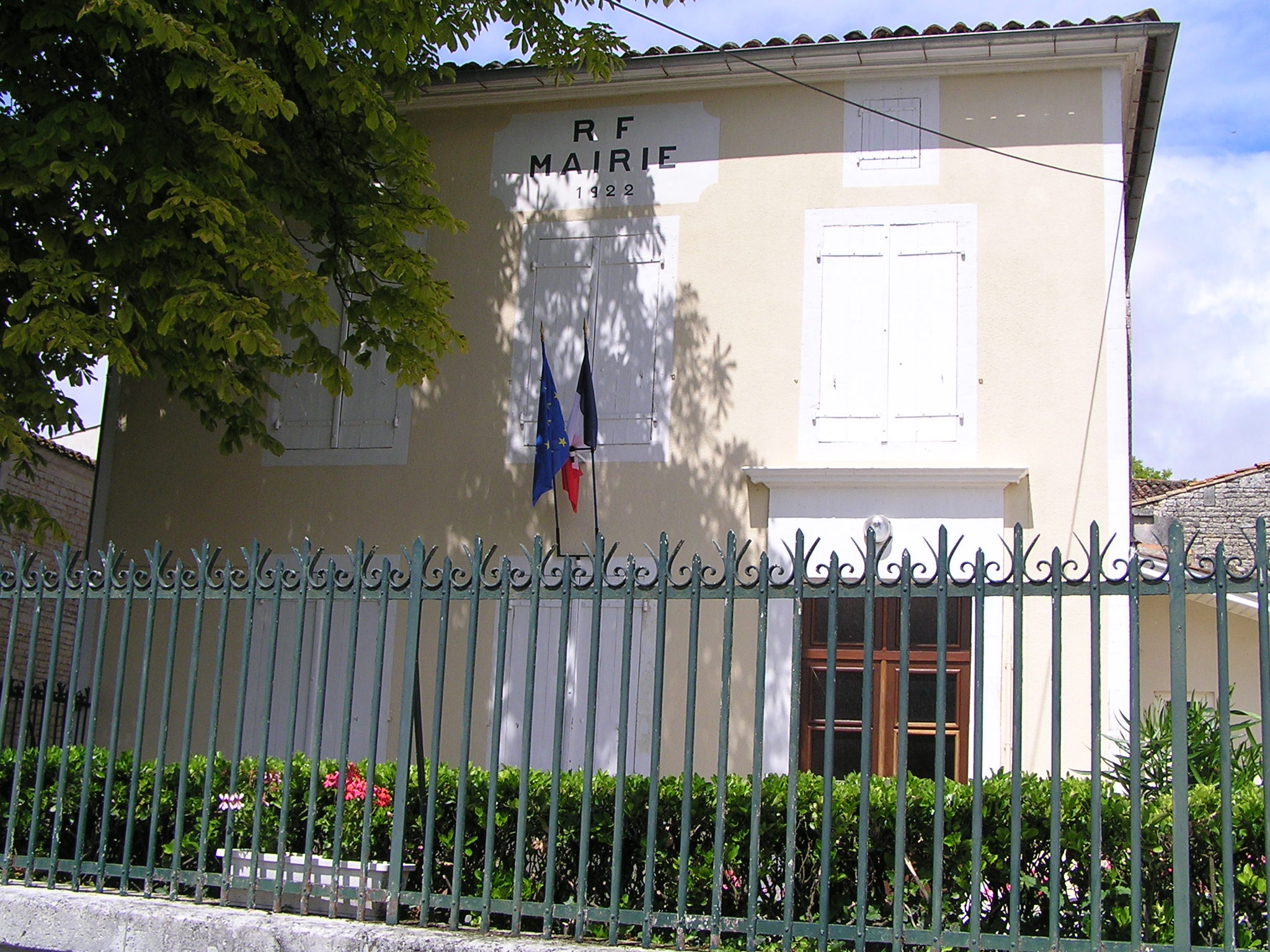 mairie de Fleurac